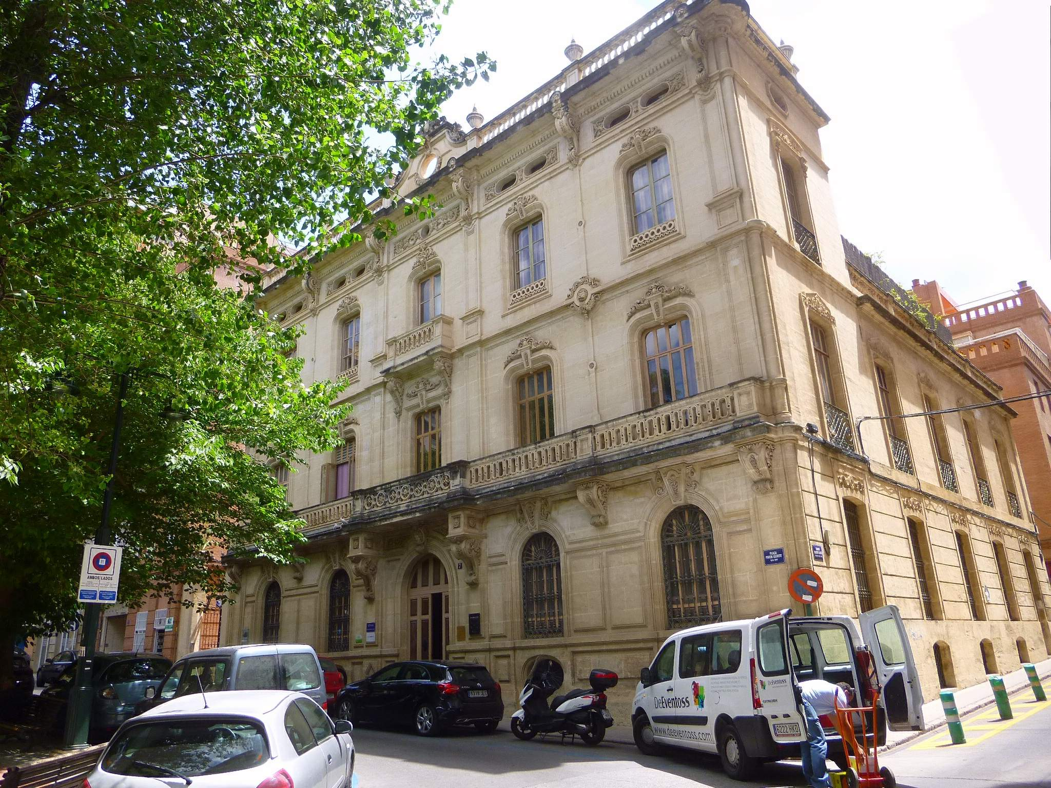 Alcoy - Palacete de Albors